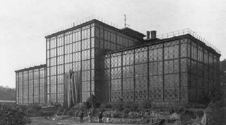 Königlicher Botanischer Garten Berlin-Schöneberg: Großes Palmenhaus, erbaut 1857/58 nach Entwurf von Carl David Bouché